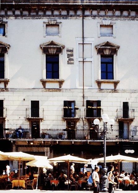 Piazza Erbe, Verona. Palazzo del Mercato Vecchio, a part of the facade